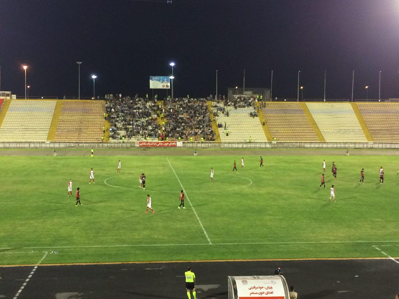 دربی مشهد در ورزشگاه ثامن